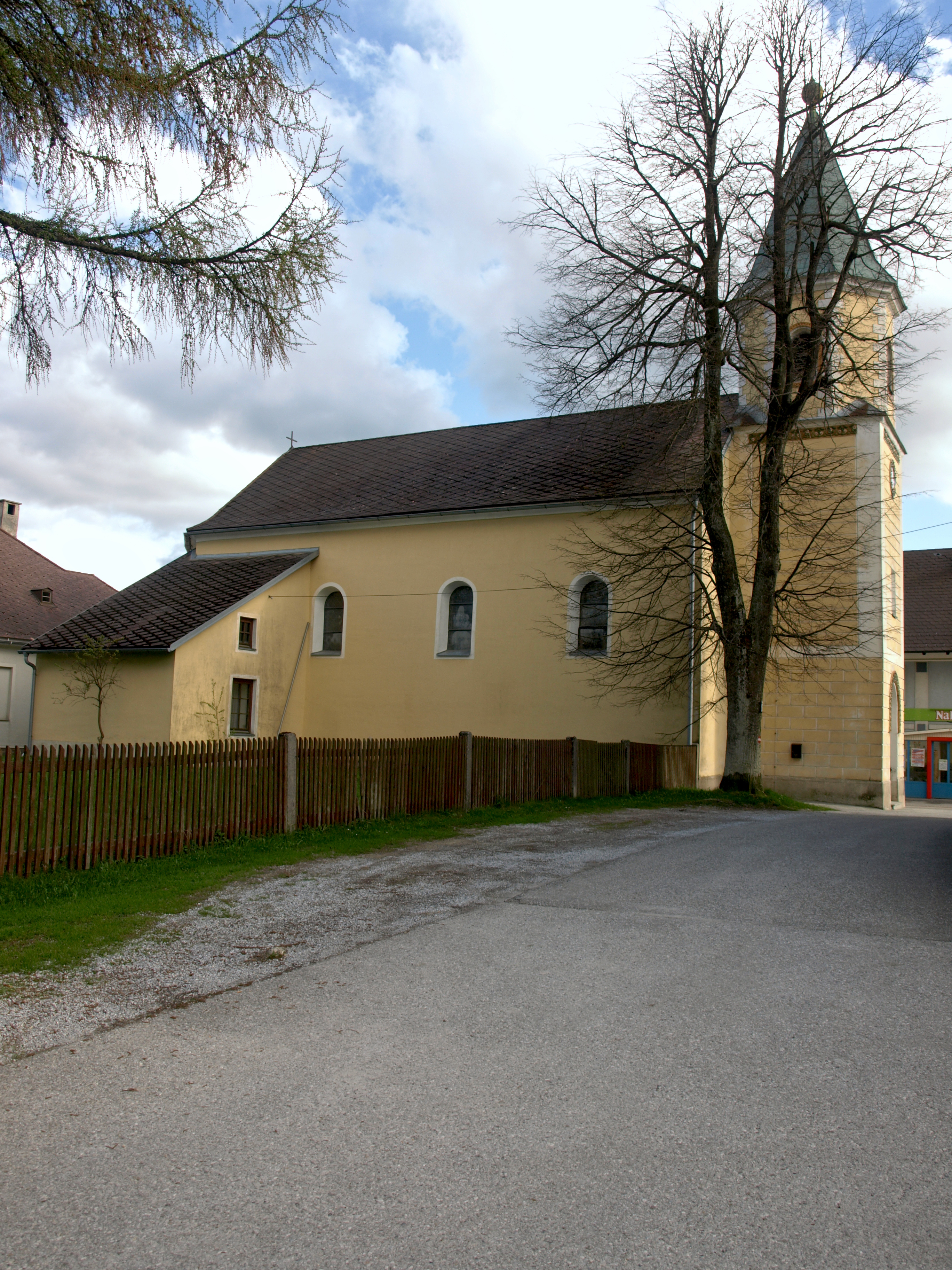 Kath. Pfarrkirche hl. Anna